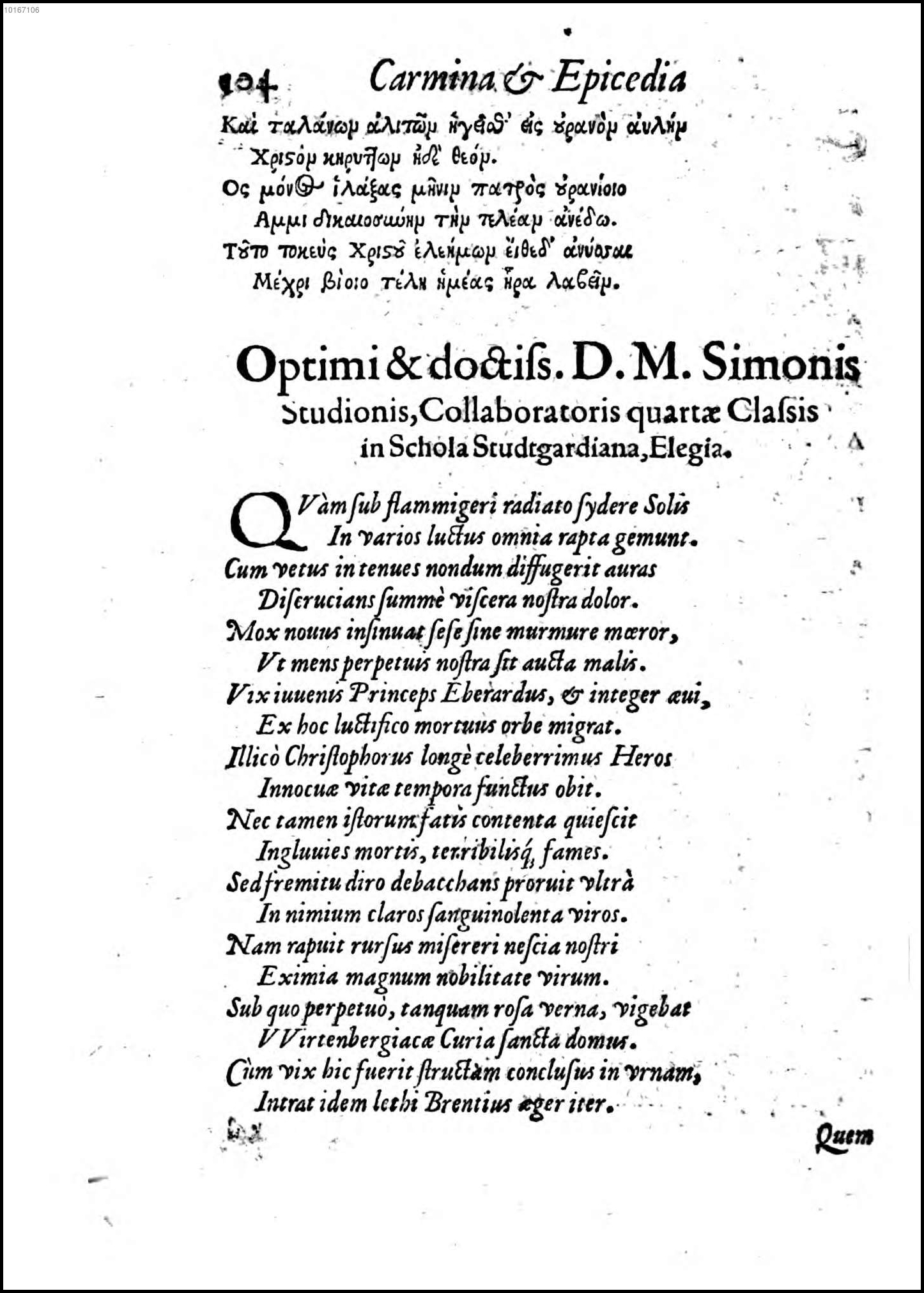 Jakob Heerbrand: Oratio funebris ... Tübingen 1570, Seite 104.